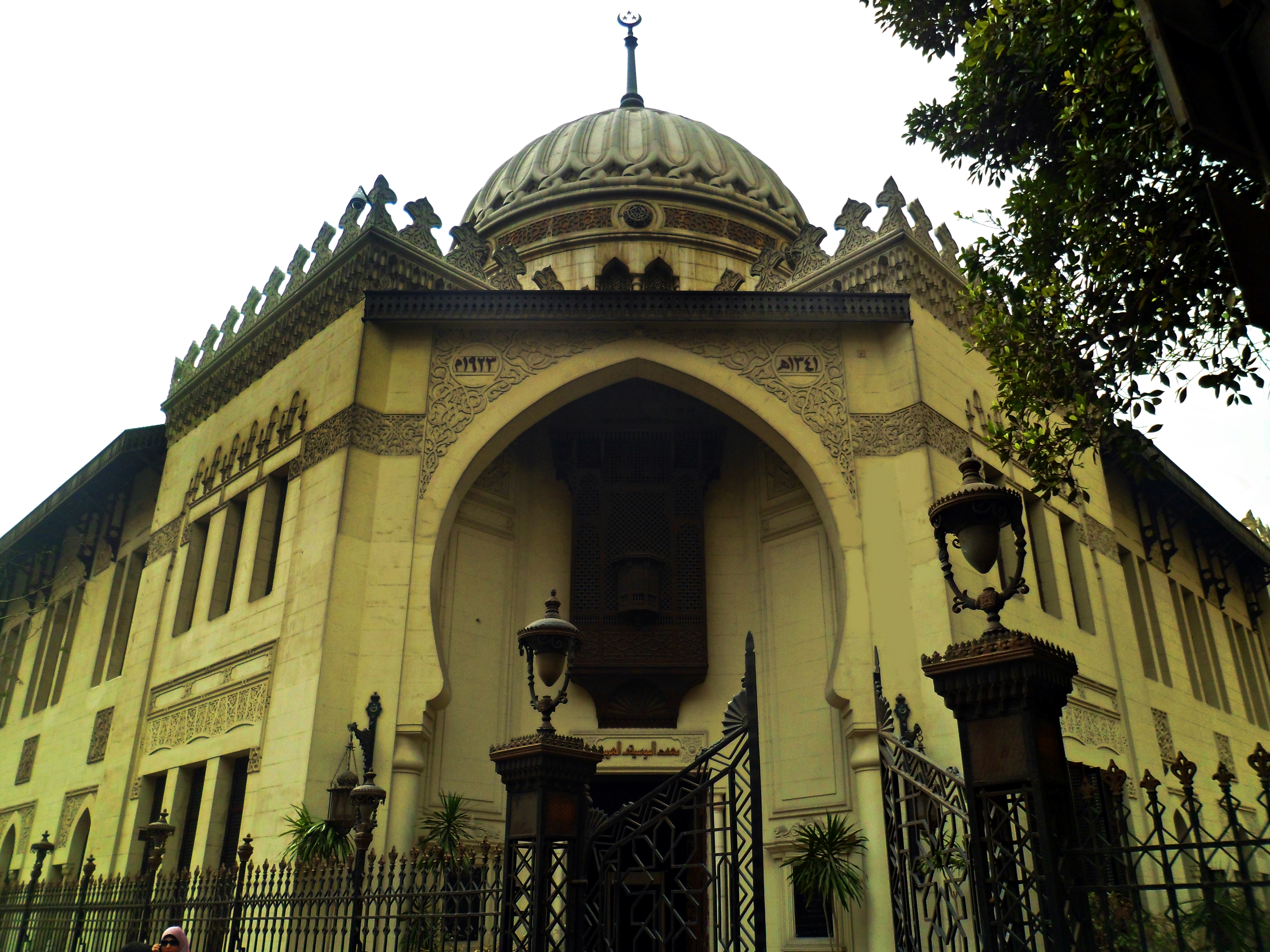 معهد الموسيقى العربية